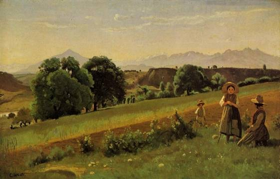 Mornex (Haute-Savoie). – Au fond, le mole., in Alfred Robaut, L'œuvre de Corot, n°508.